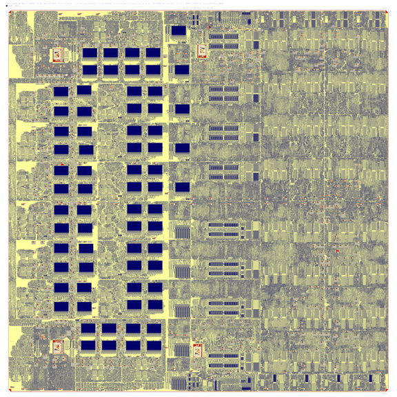 Layout des TRIPS-Prozessor Prototypen